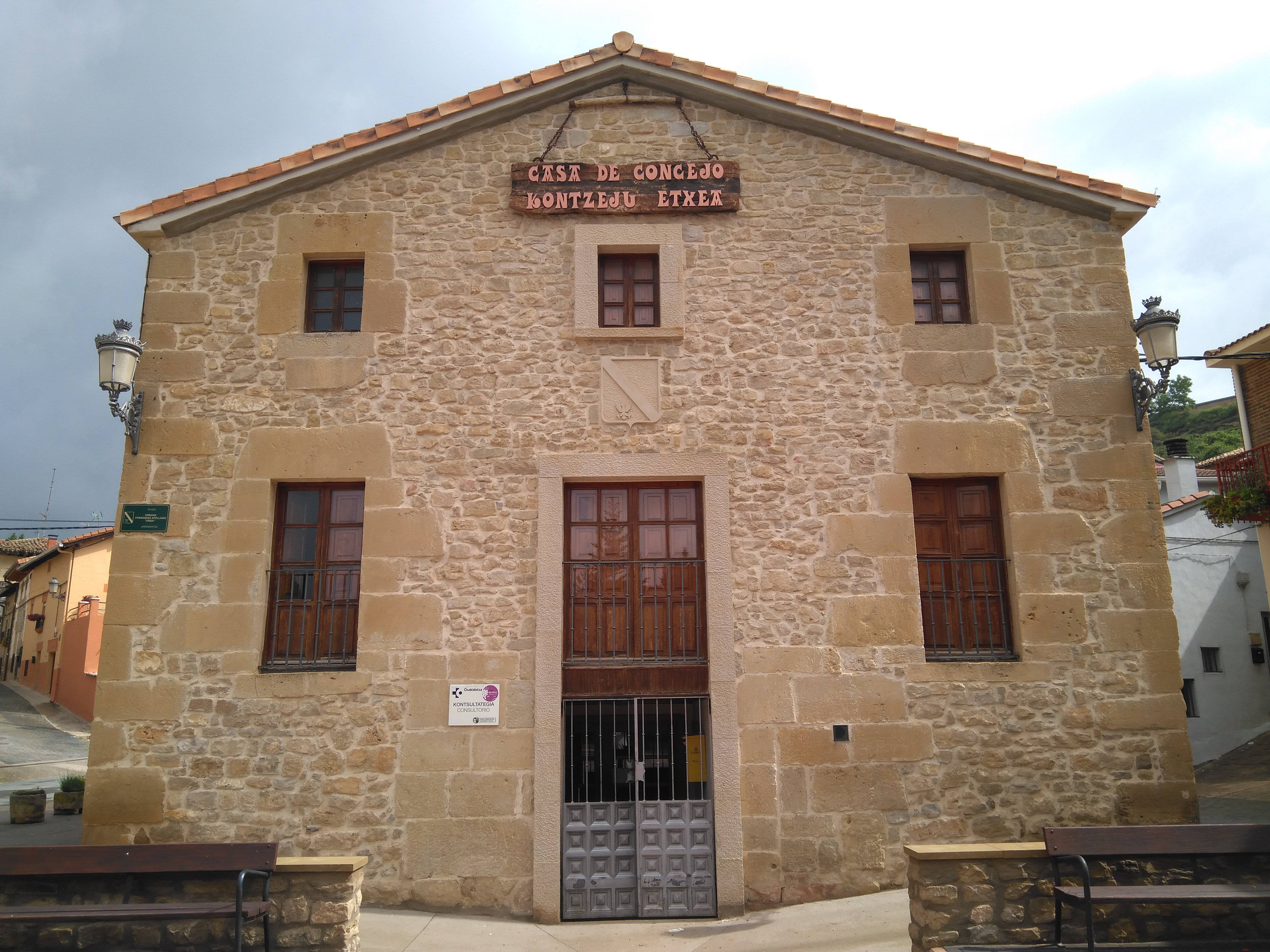 Concejo perteneciente al municipio de Oyón de la Cuadrilla de Rioja Alavesa (Álava)